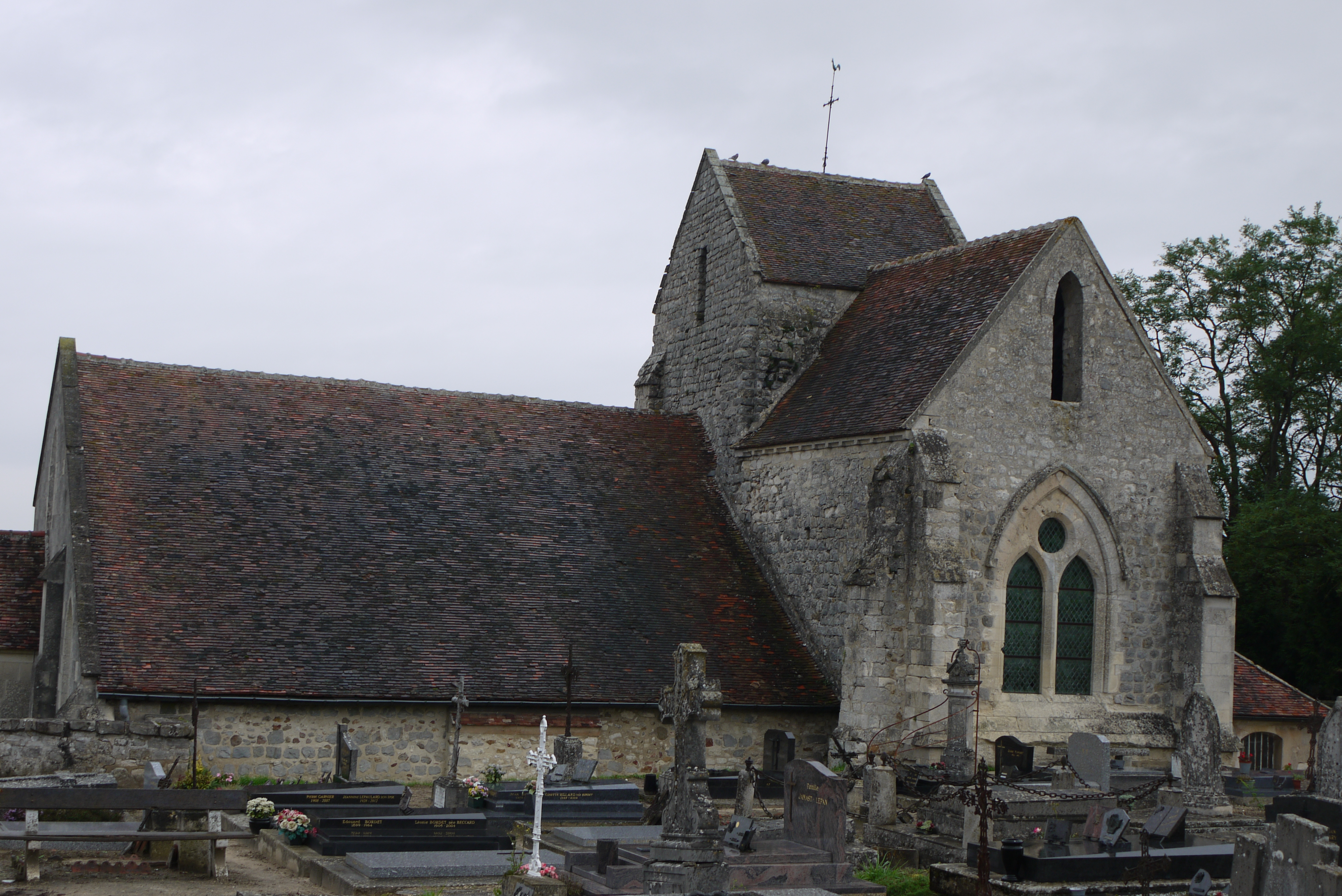 Église Saint-Rémy de Bruyères-sur-Fère.